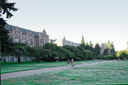 9月の学内風景